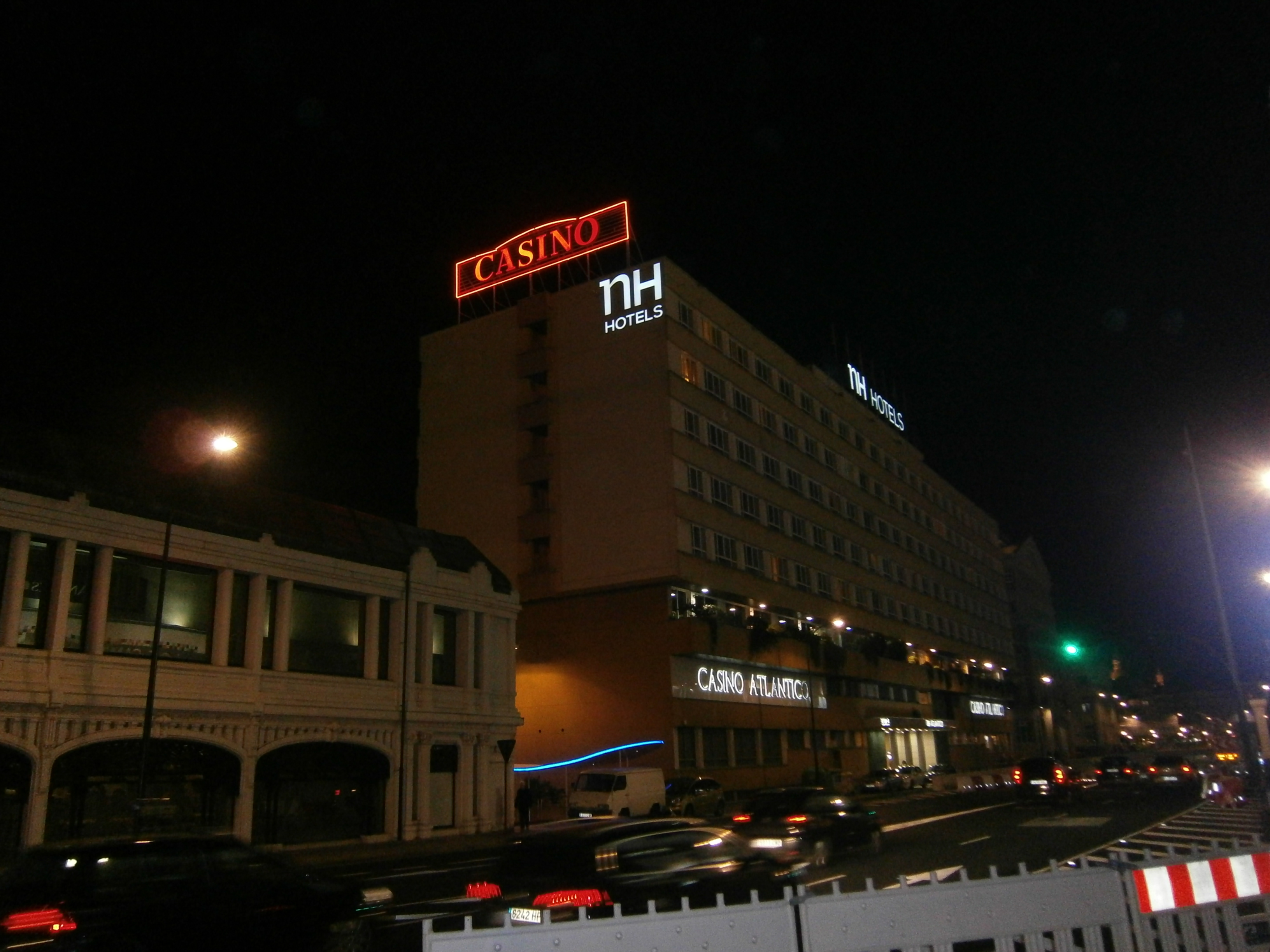 Hotel e Casino Atlántico (A Coruña).